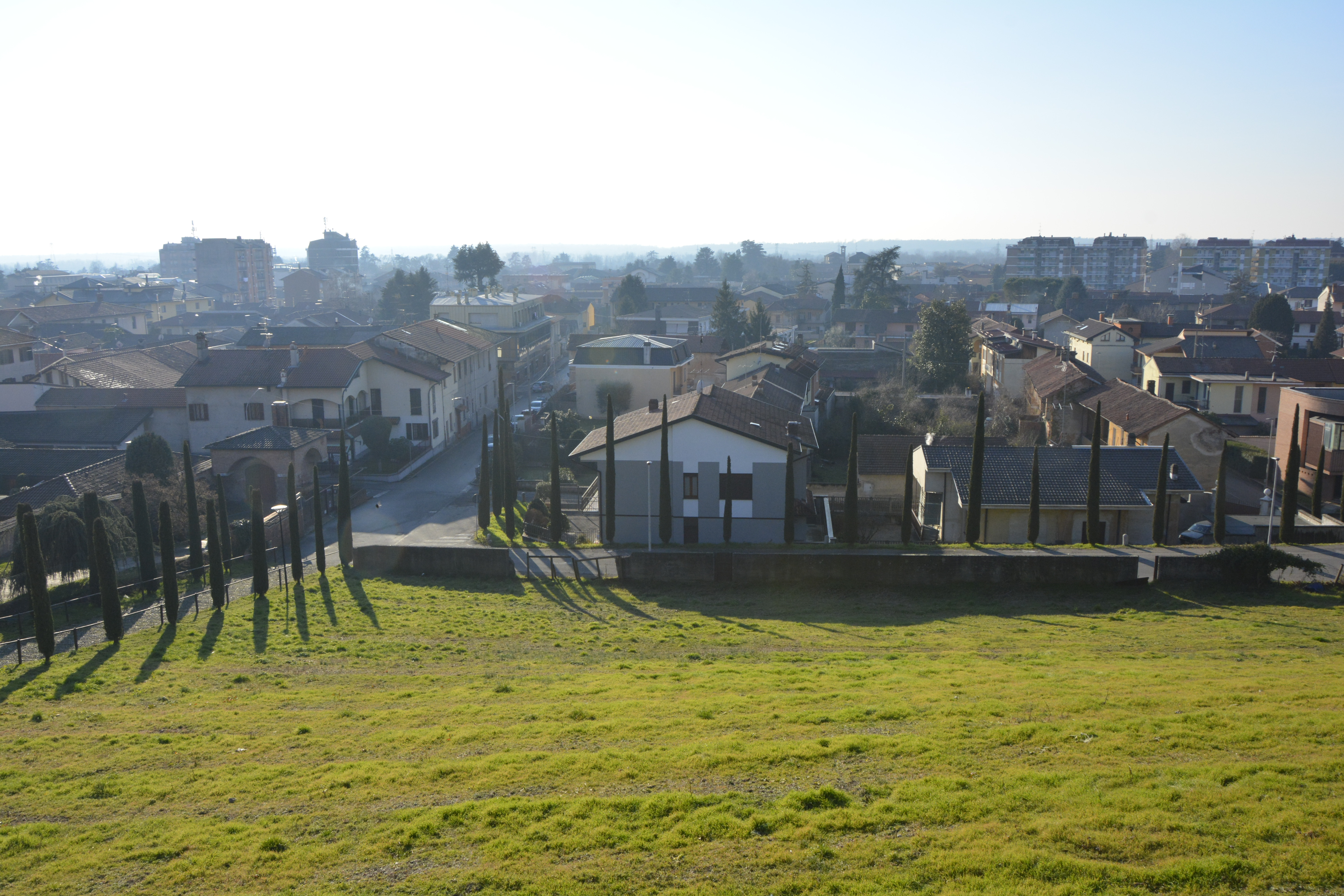 Panorama su Turbigo, nella città metropolitana di Milano, dal sagrato della chiesa di Santa Maria Assunta.